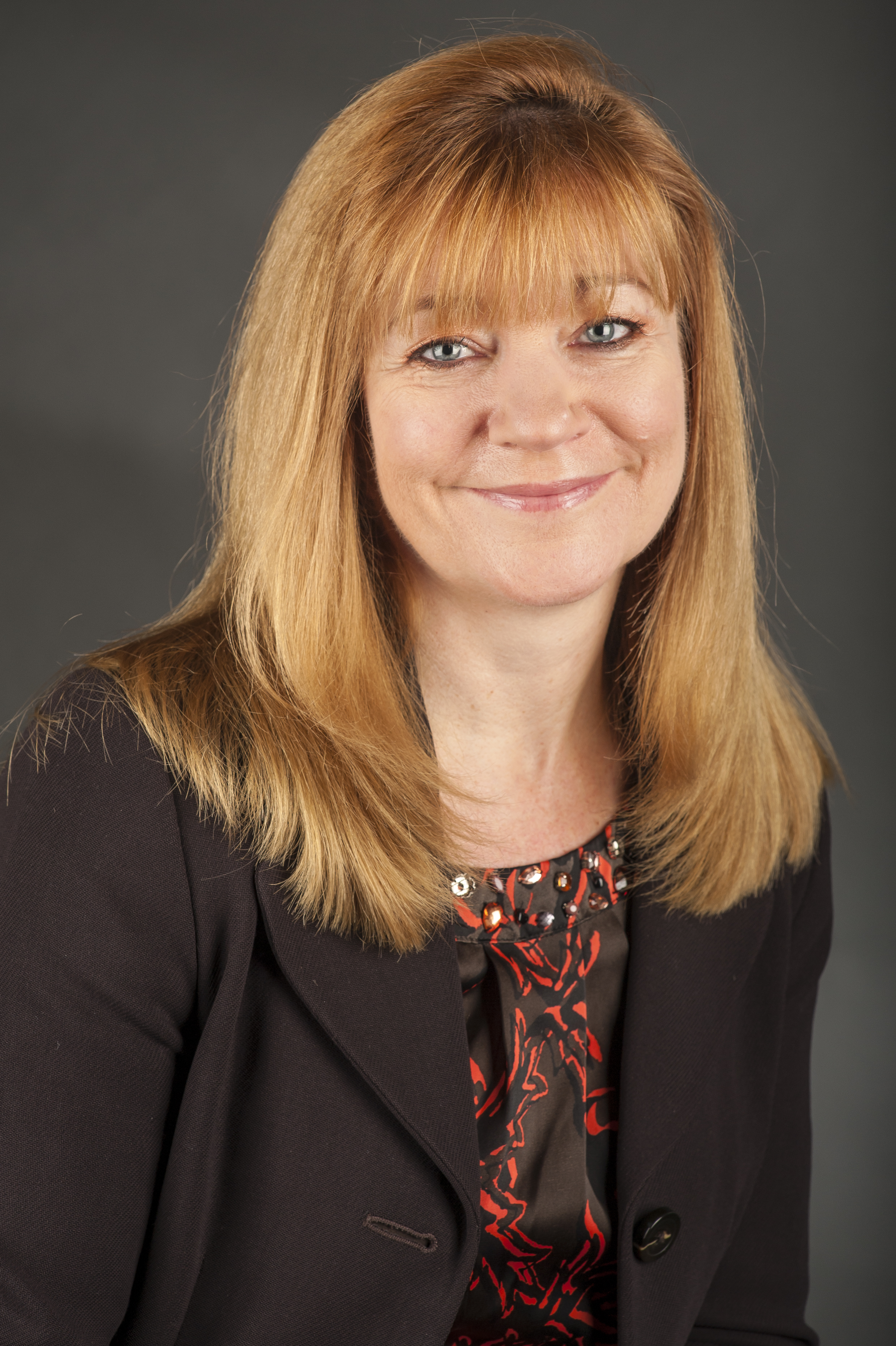 Kay Swinburne